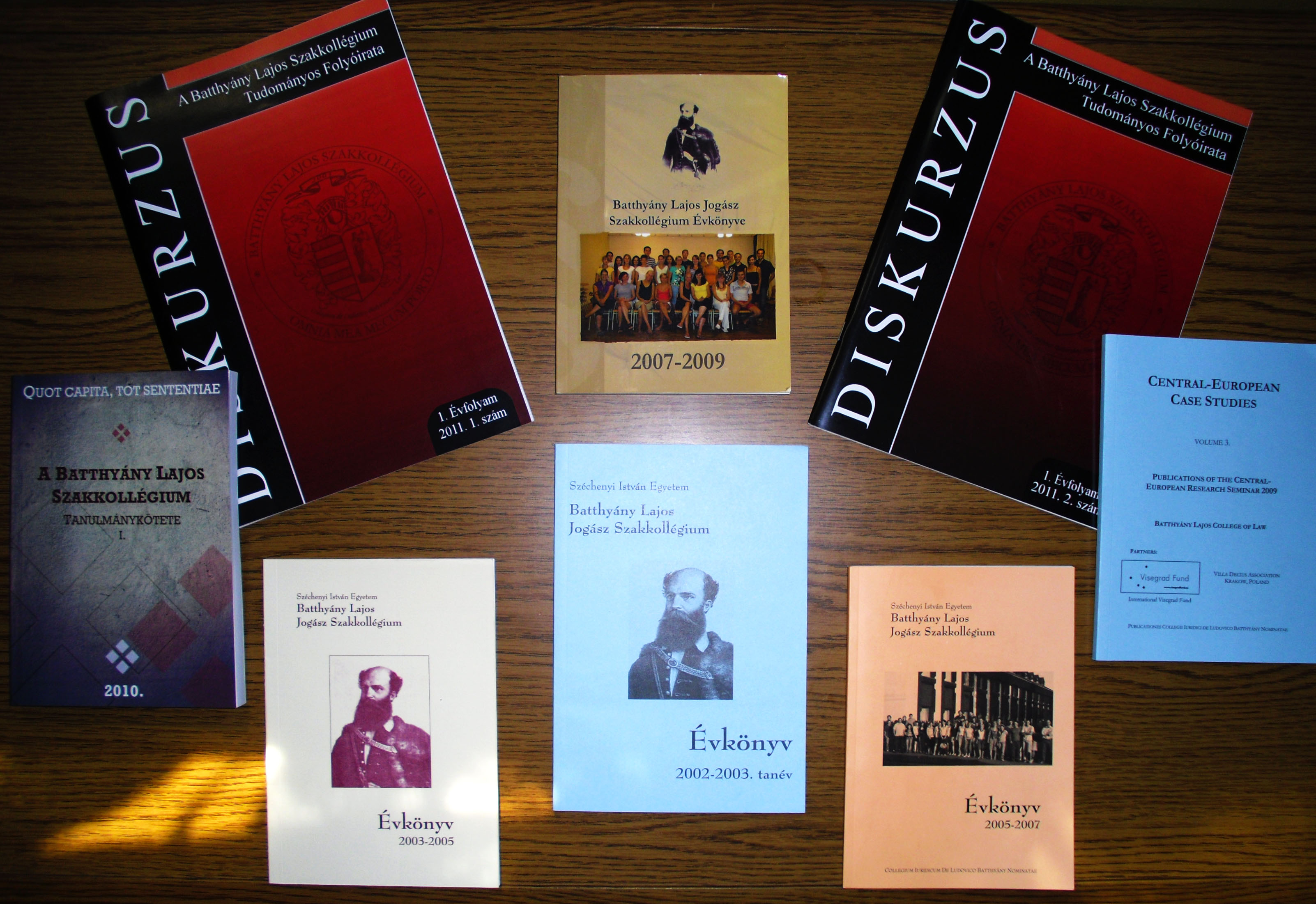 A szakkollégisták által készített kkiadványok